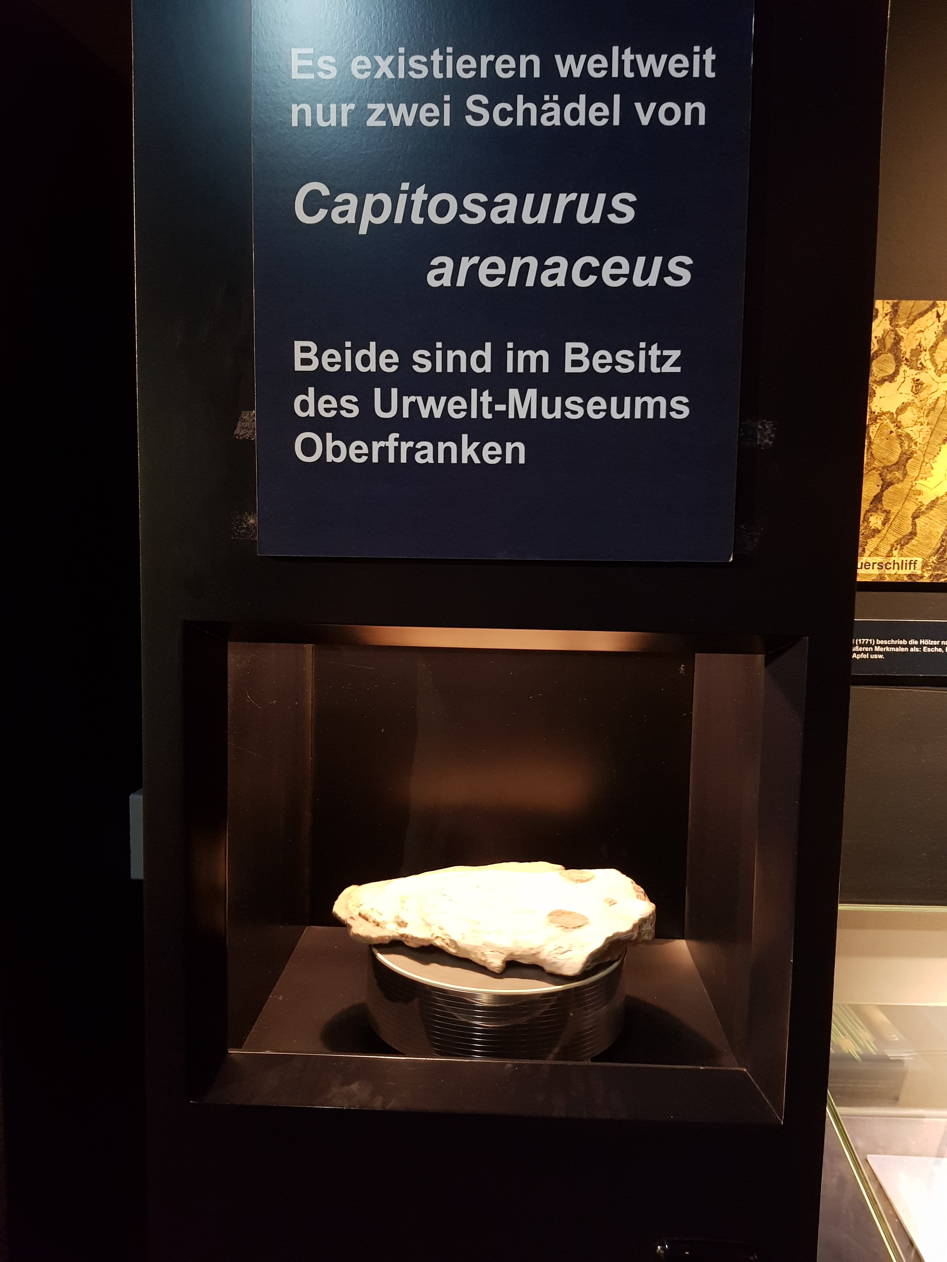 Beleuchtete Ausstellungsvitrine eines Capitosaurus arenaceus Schädels im Urwelt-Museum Oberfranken, Bayreuth